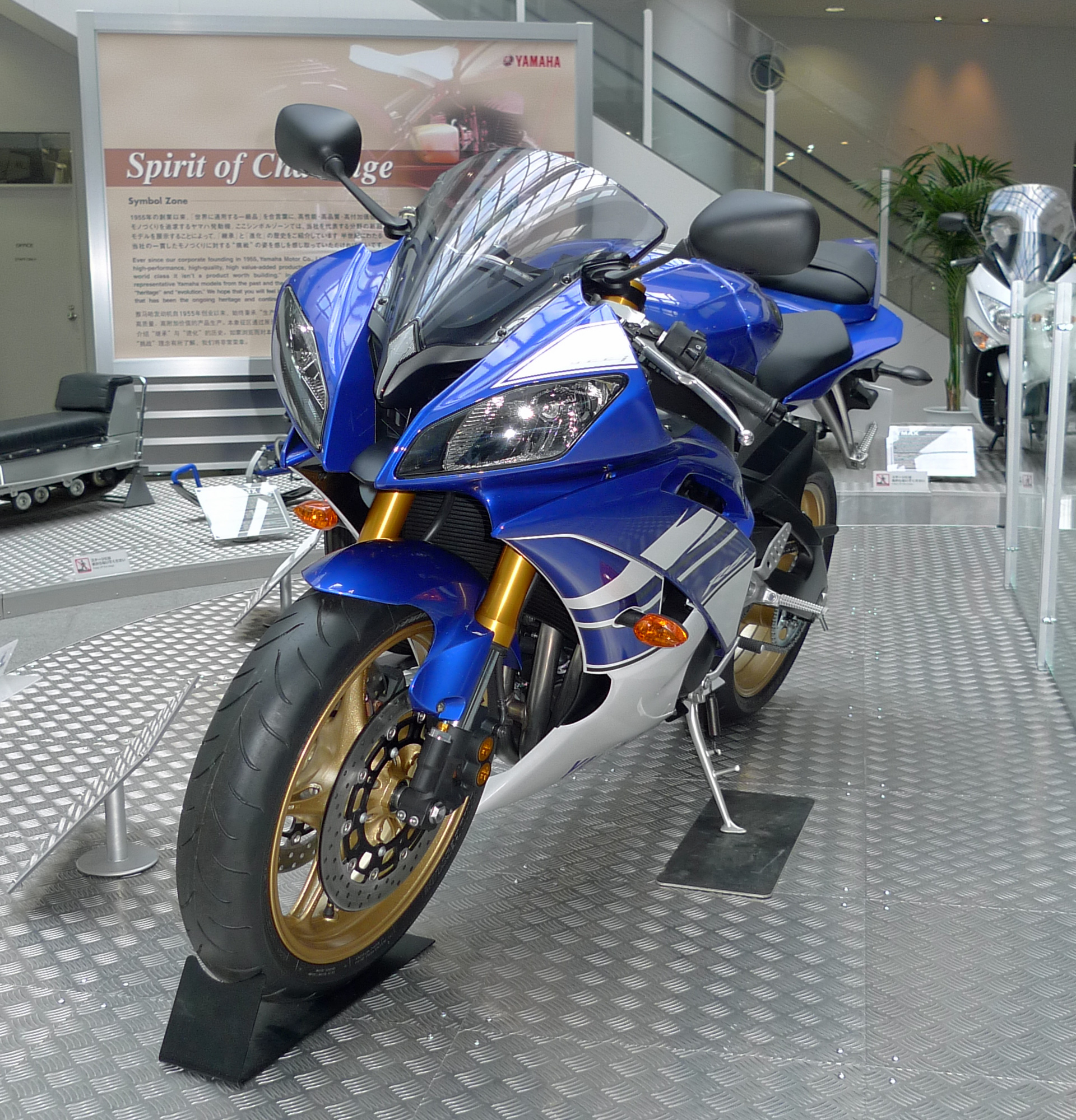 ヤマハ・YZF-R6 2010 左斜め方向から撮影 ヤマハコミュニケーションプラザにて撮影